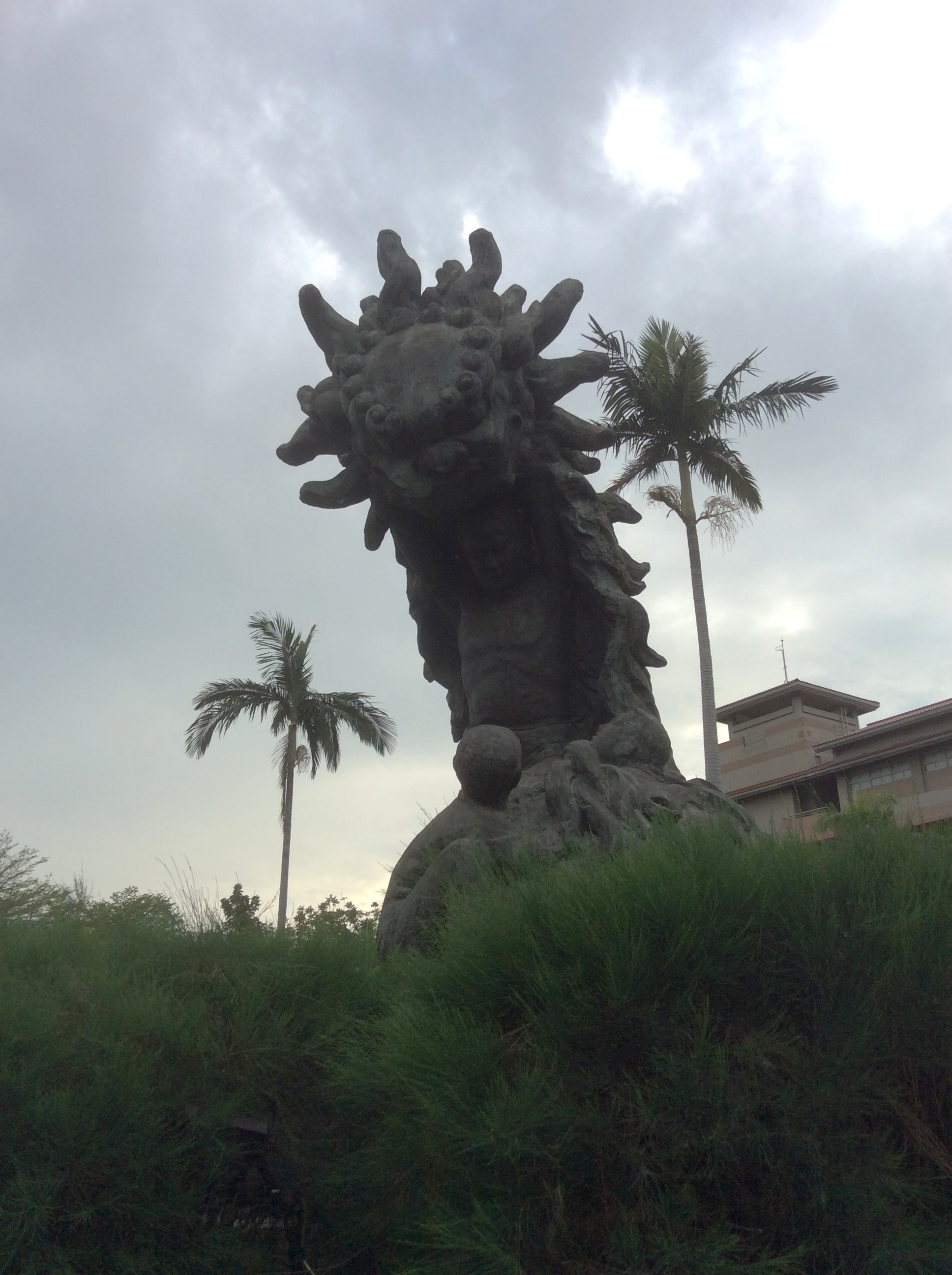 獅甲國中雕塑 - 舞獅雕像